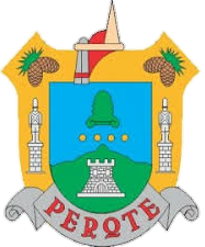 Escudo de armas del municipio veracruzano de Perote.